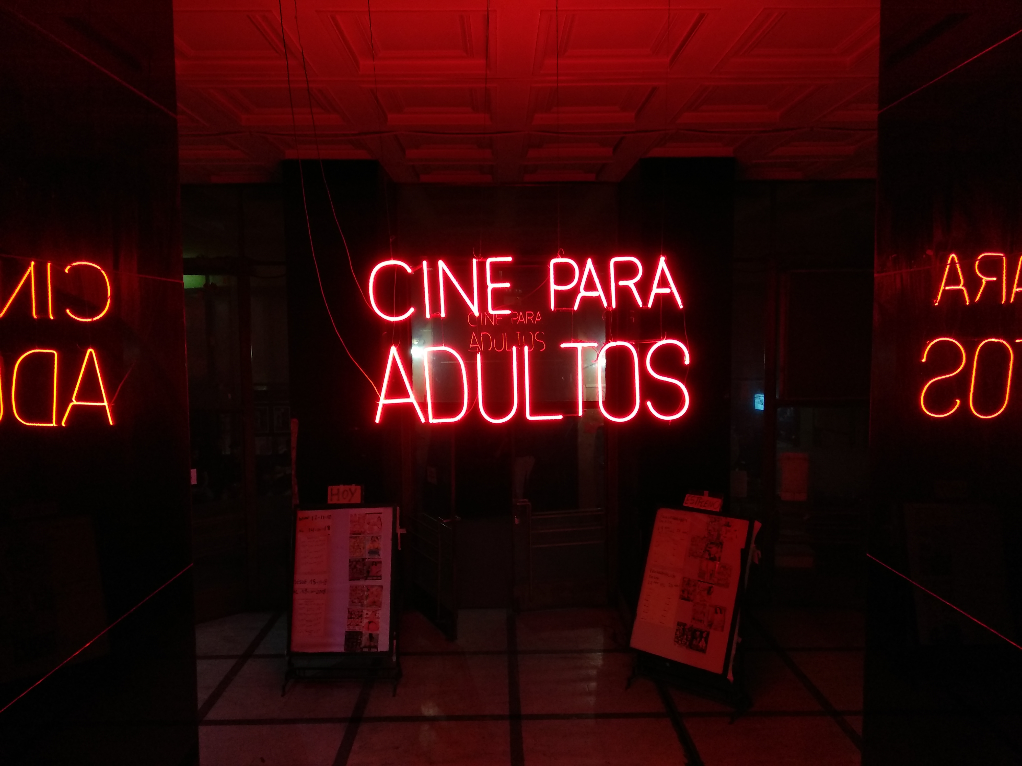 Cine para adultos ubicado en calle Compañía de Jesús 1078, Santiago de Chile.